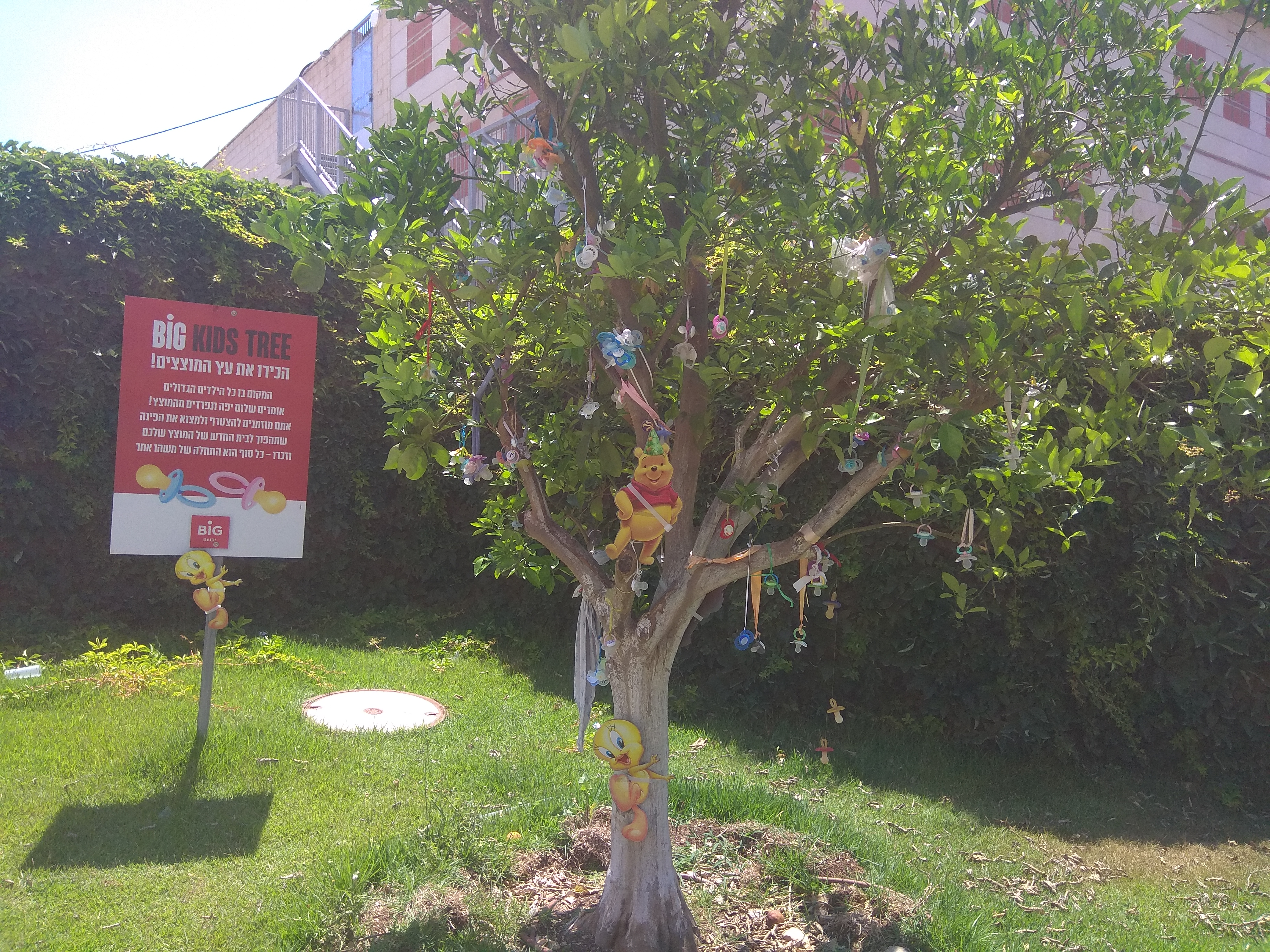 עץ מוצצים במרכז ביג ביקנעם עילית